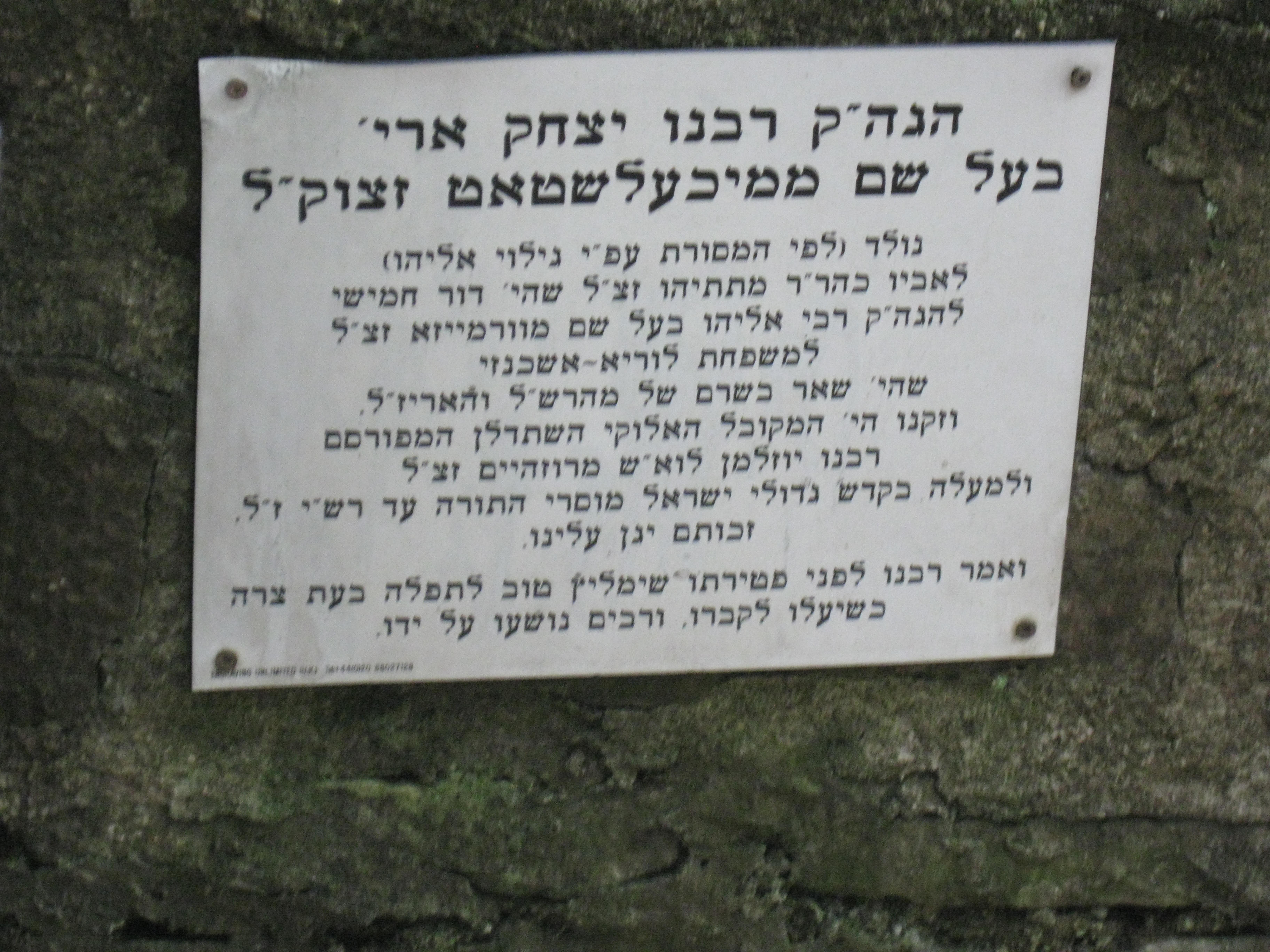 Frischmilchautomat in Tannheim, bei Memmingen